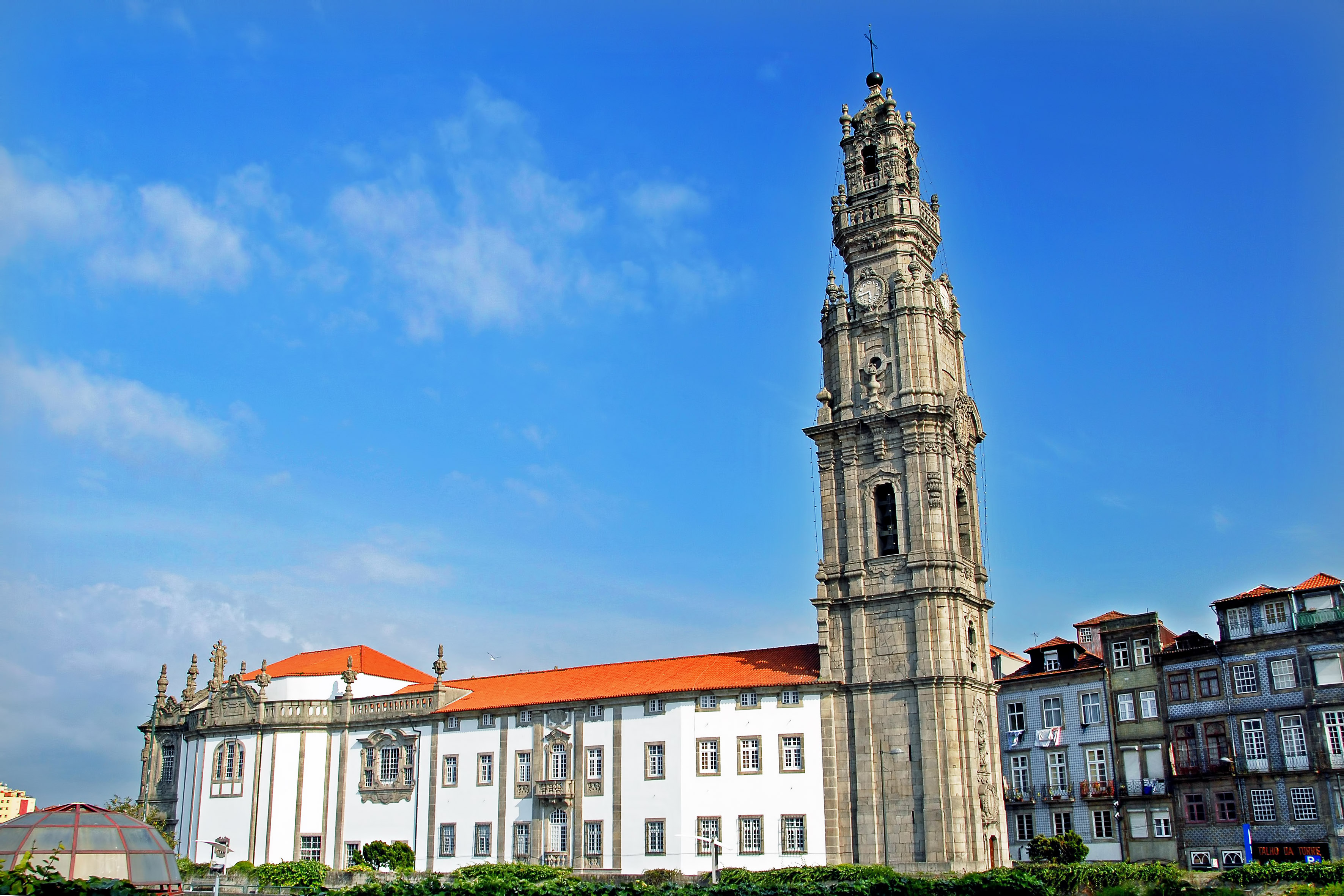 Igreja e Torre dos Clérigos This file was uploaded for Wiki Loves Monuments in Portugal with the unique identifier 70401.